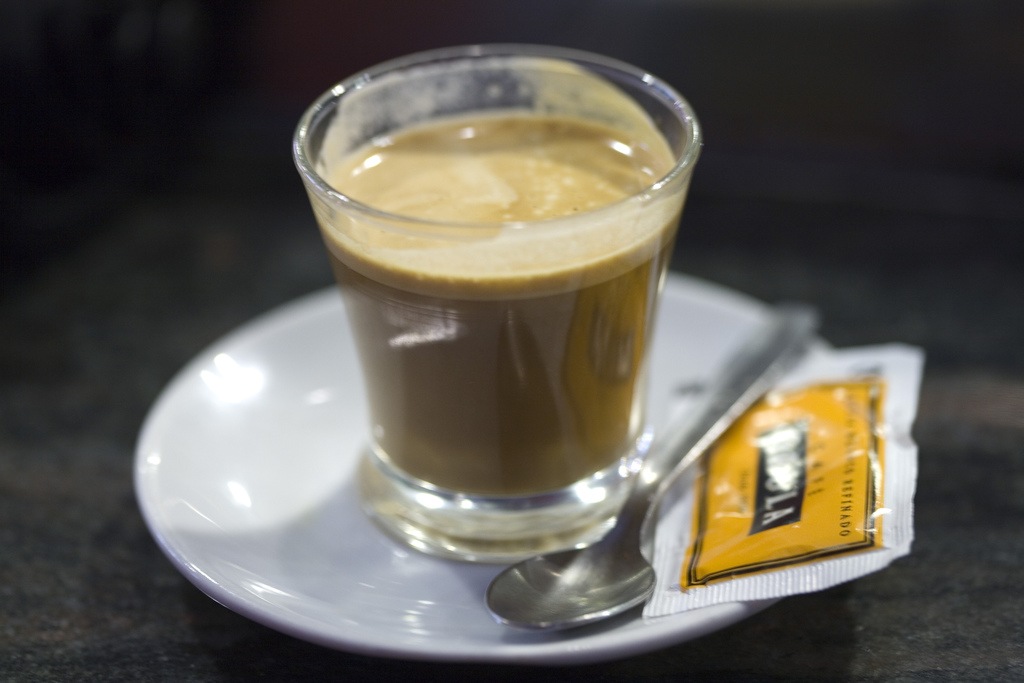 Café Cortado (Tallat en Cataluña)